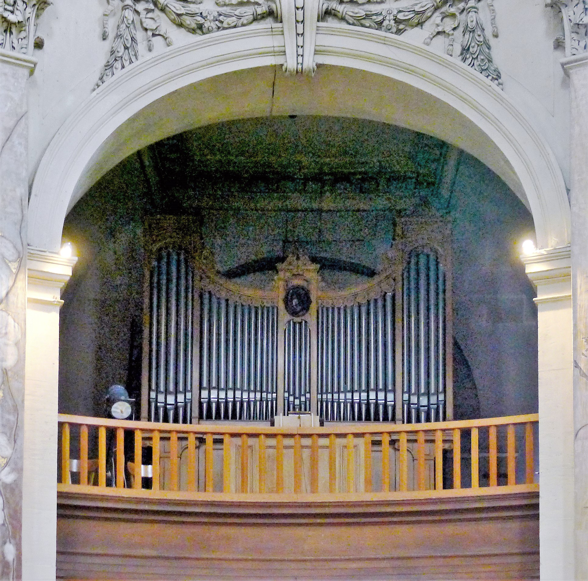 Temple du Marais situé rue Saint-Antoine (orgue) - Paris IV